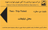 2 gedişlik bilet